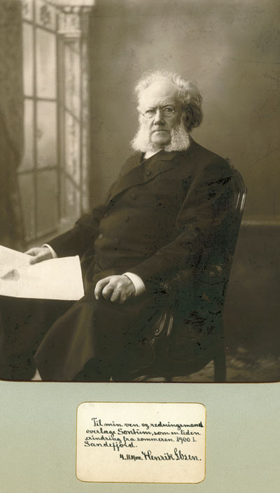 Henrik Ibsen phototographed by Gustav Borgen (1865-1926). Kabinettfoto av Gustav Borgen i 1898, med hilsen til overlege Christian Sontum ved Sandefjord Bad, sommeren 1900.